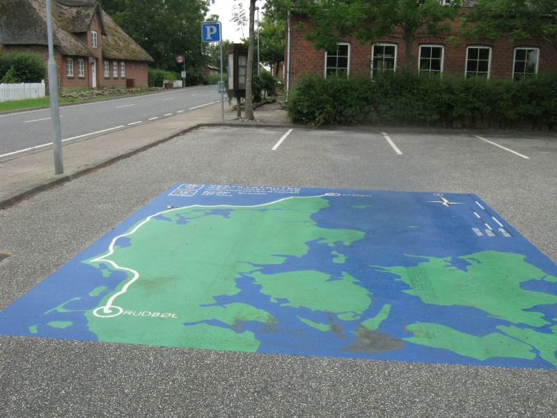 Karte mit dem Verlauf der Vestkystruten/ EuroVelo 12/ North Sea Cycle Route auf einem Parkplatz in Rudbøl, Startpunkt der Vestkystruten.